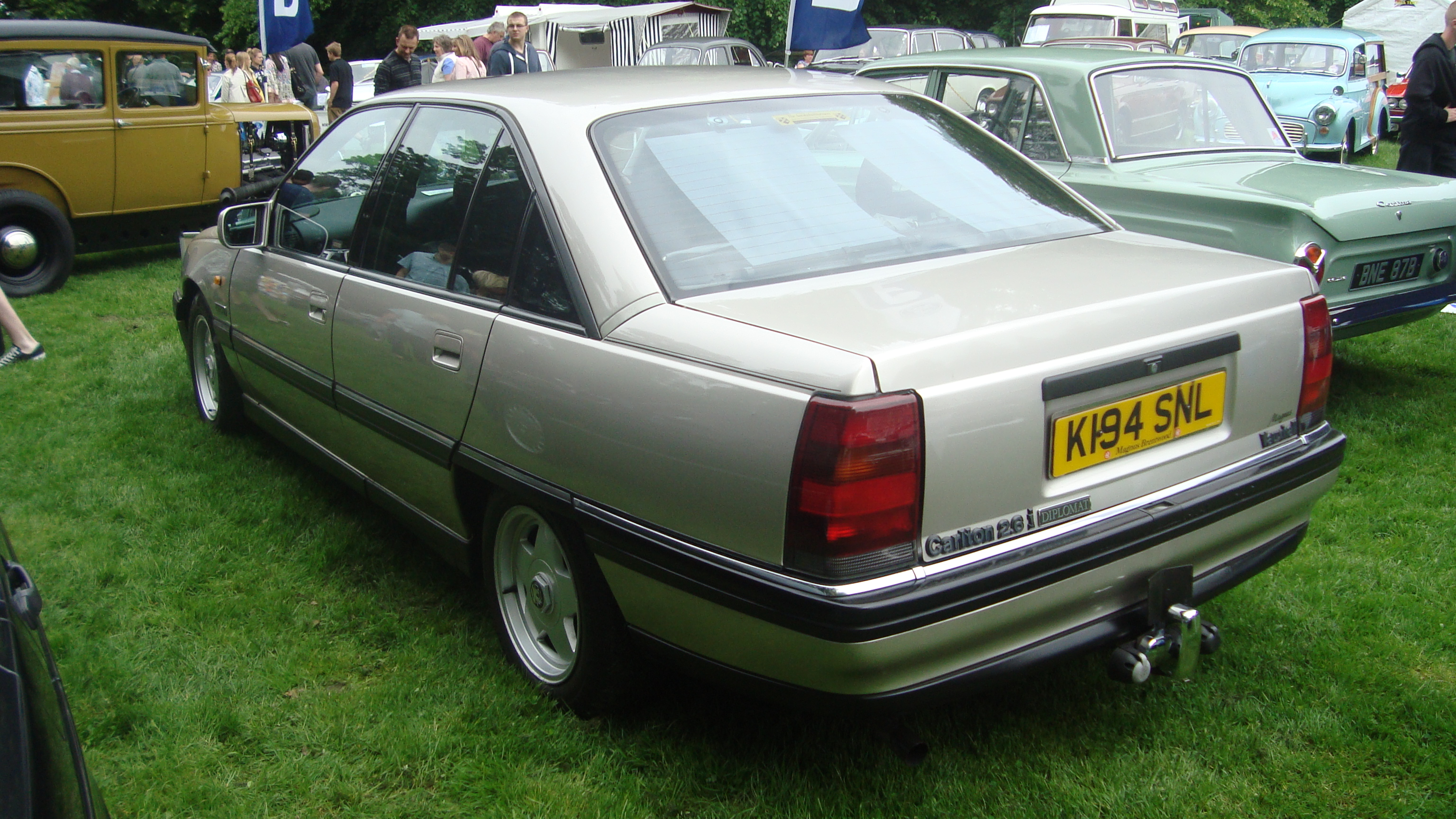 1993 Vauxhall Carlton 2.6i Diplomat